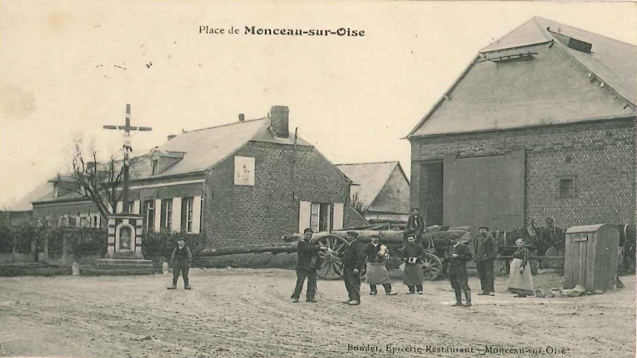 Carte postale ancienne